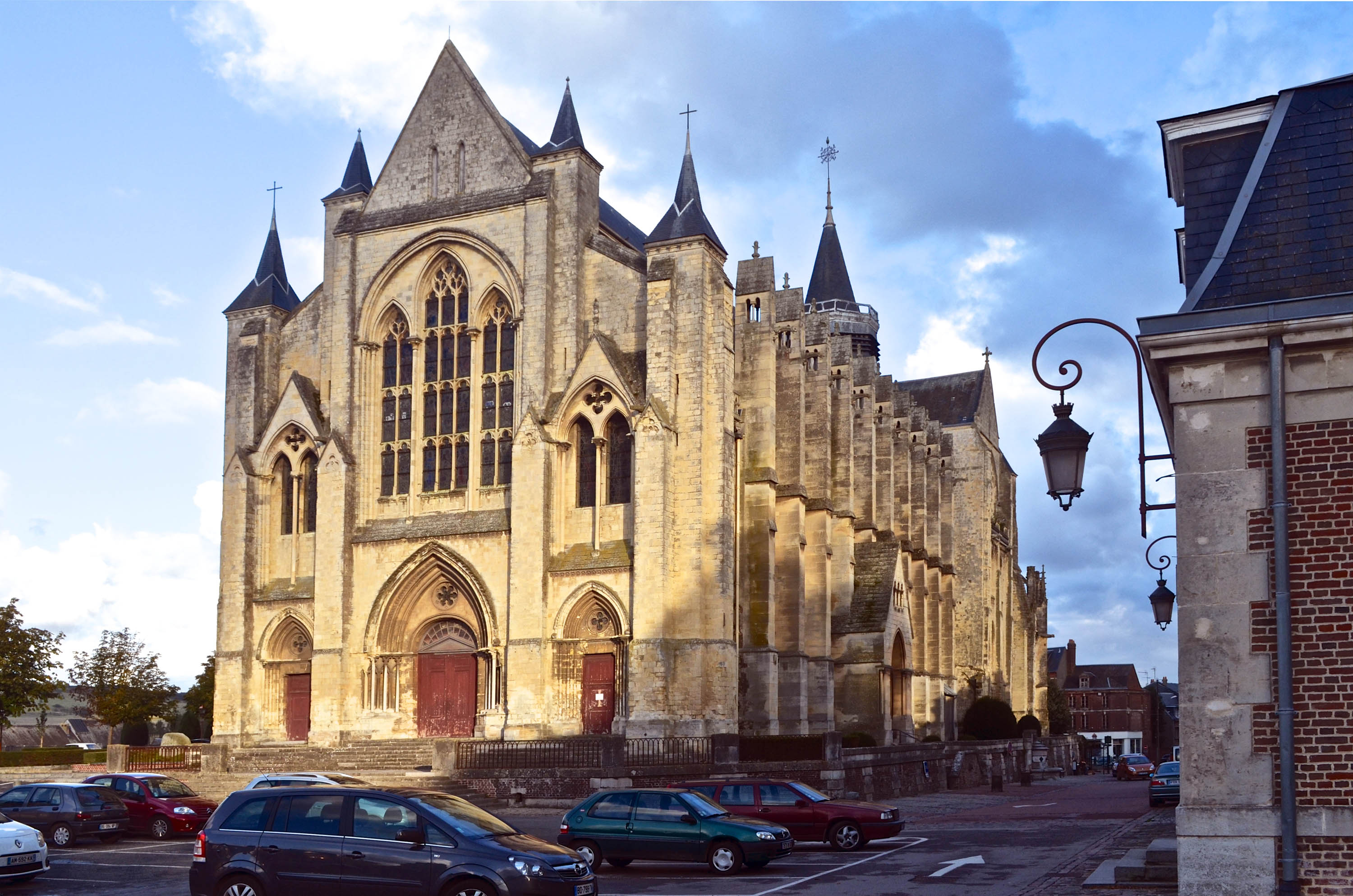 Eu (Seine-Maritime, France), collégiale Notre-Dame et Saint-Laurent